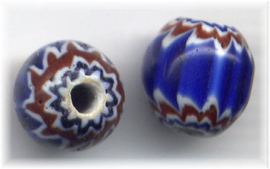 Chevron bead, Venetian.